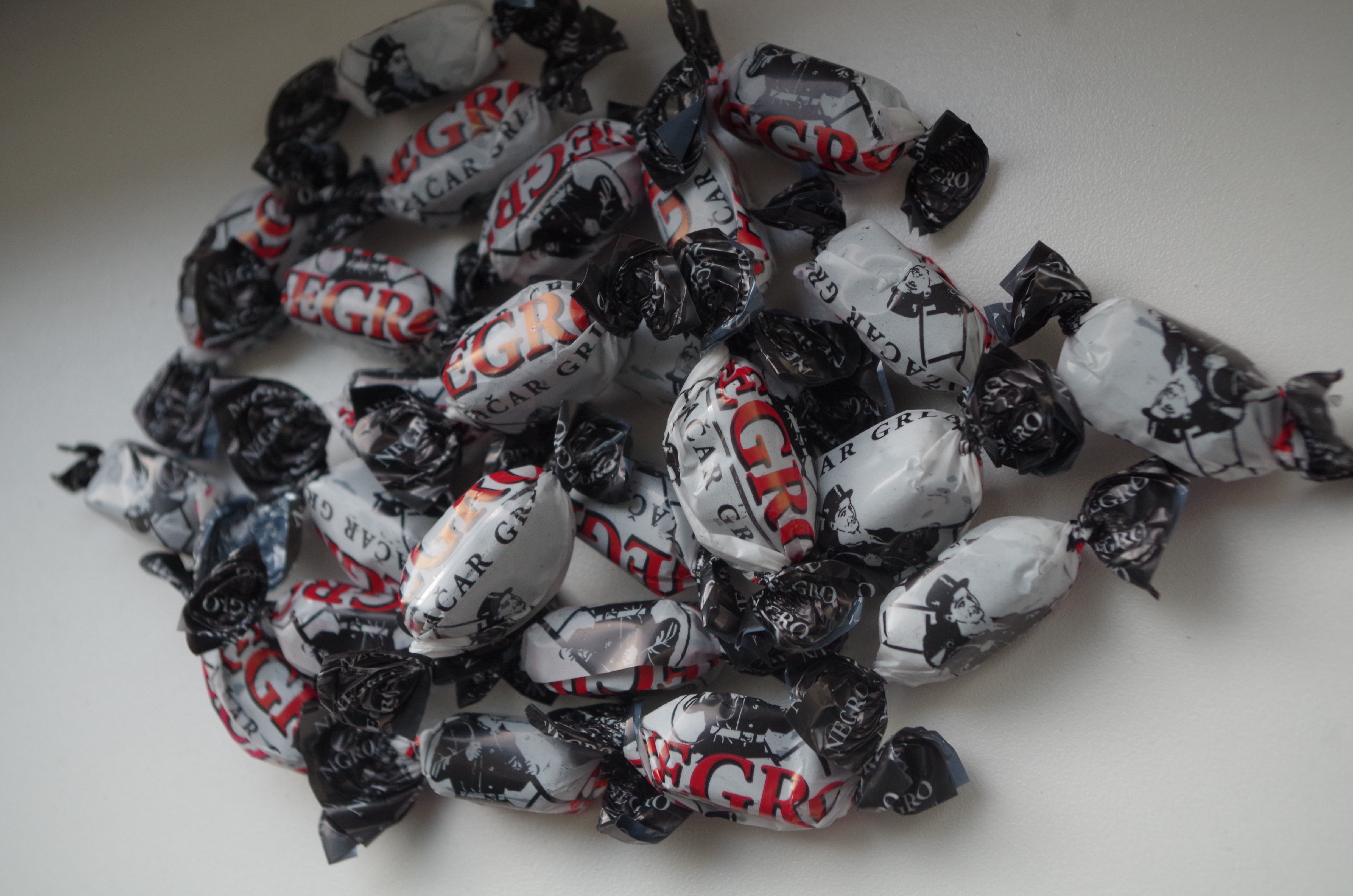 Serbias toodetud Negro kompvekid